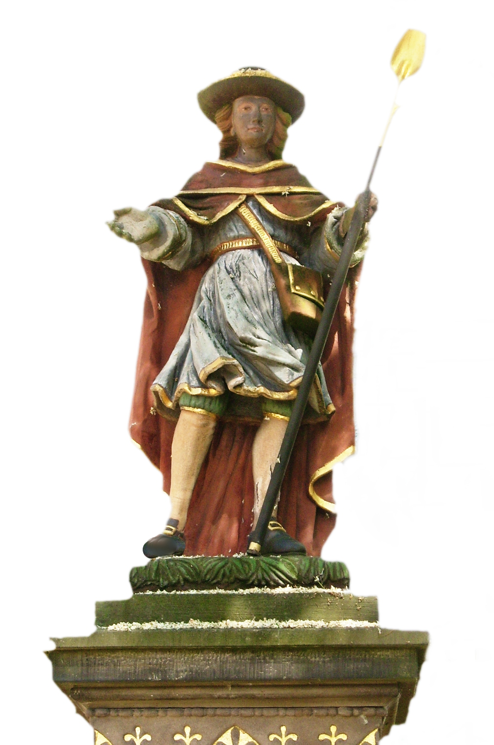 Wendelinus als Schäfer am Brunnen in St. Wendel